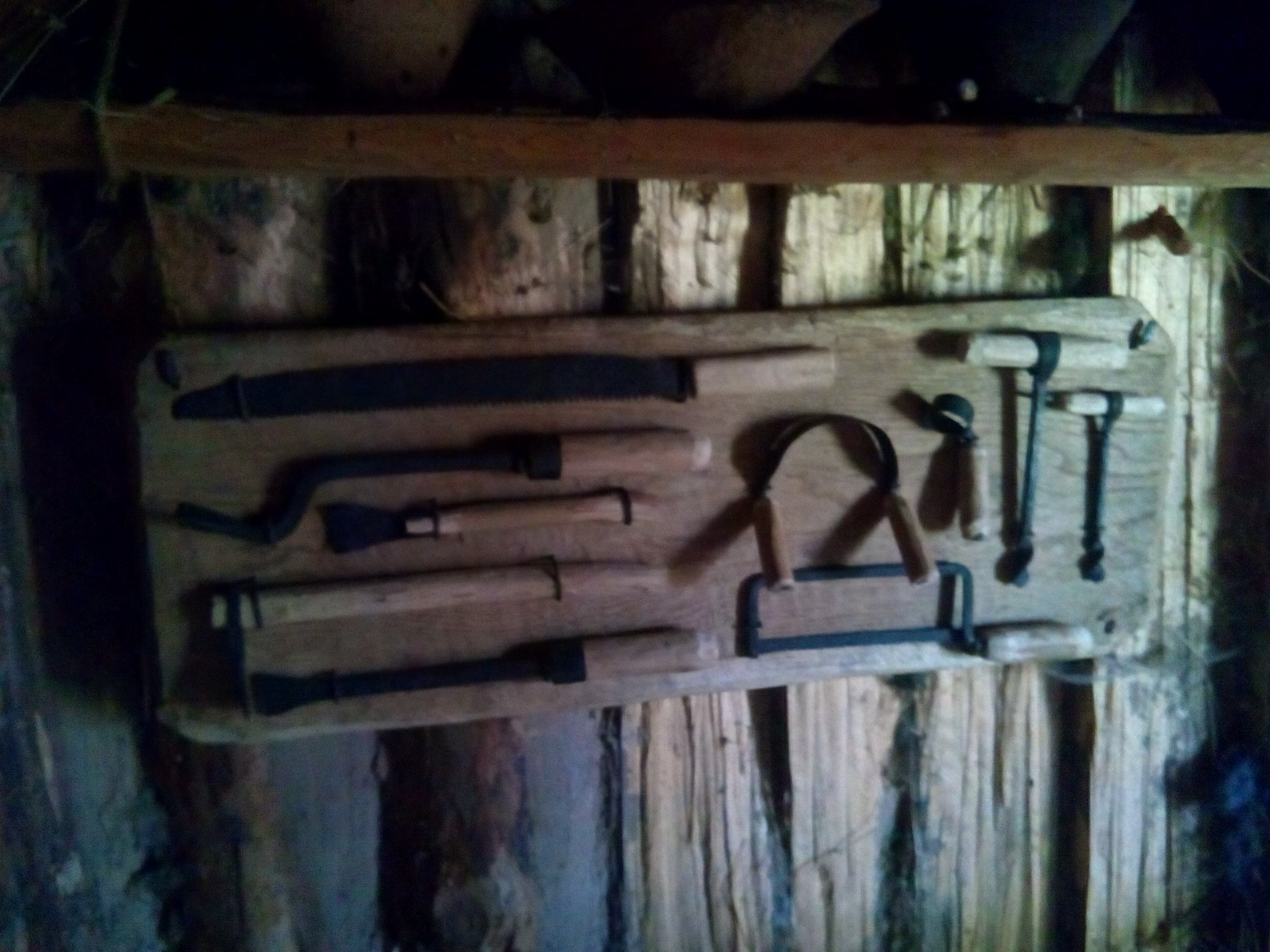 Wolin i Uznam lipiec 2014